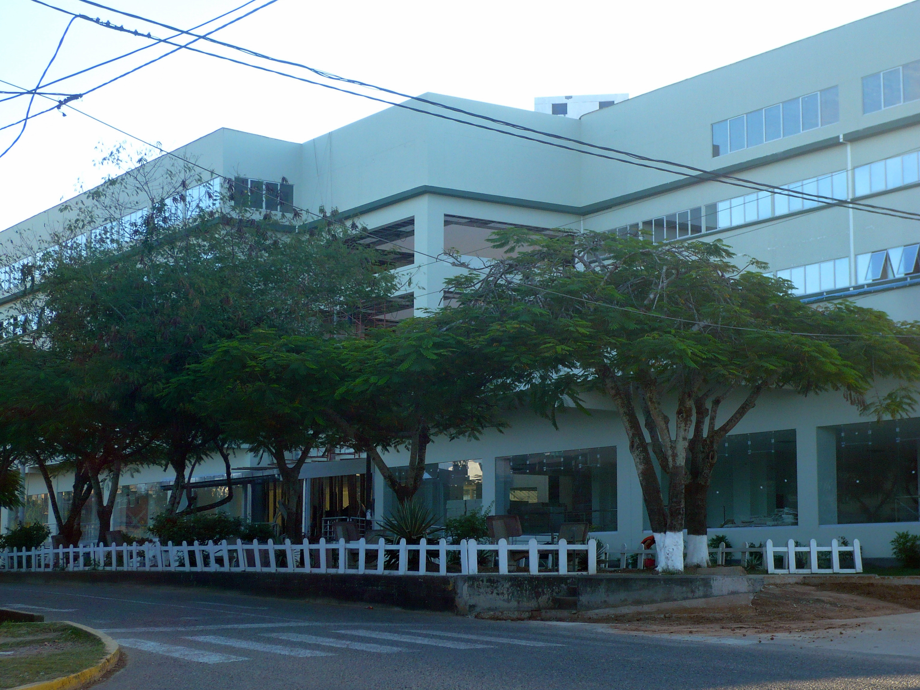 El hotel del río Ucayali llamado oficialmente Ucayali River Hotel al terminar de construirse unas semanas antes de inauguración.